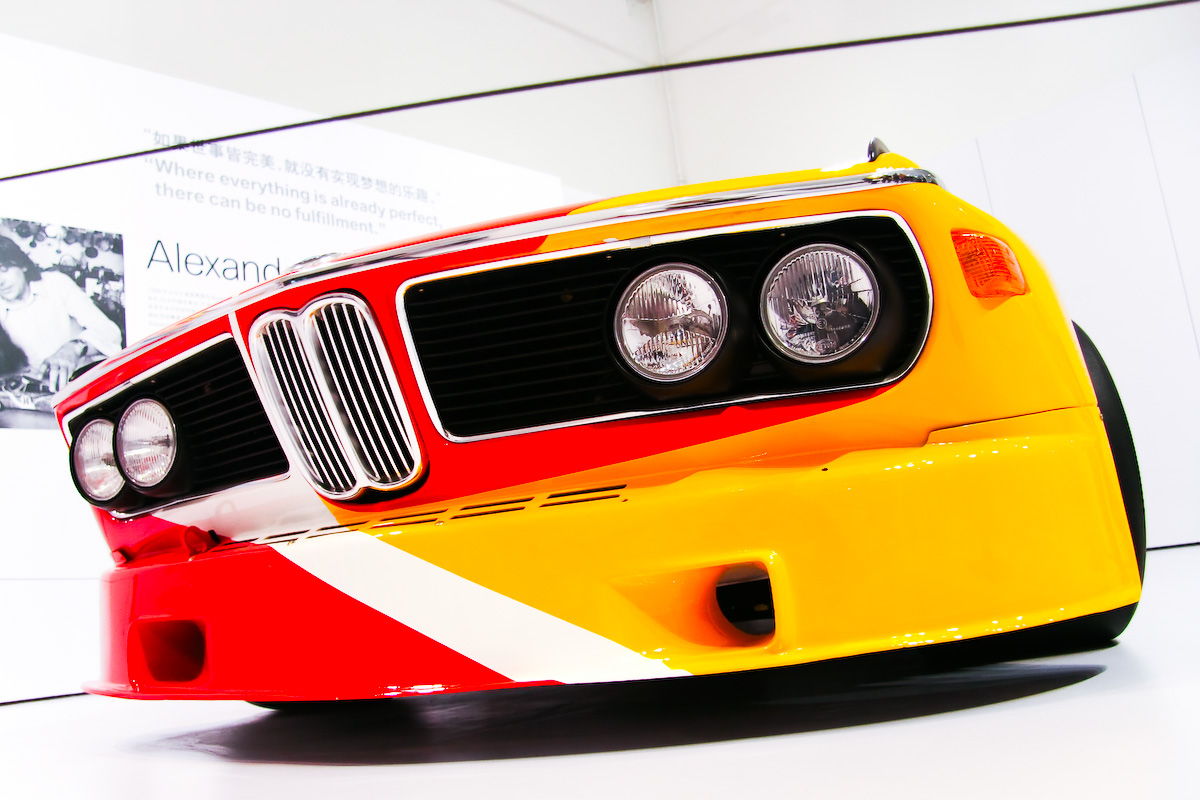 Alexander Calder 1975 BMW 3.0 CSL